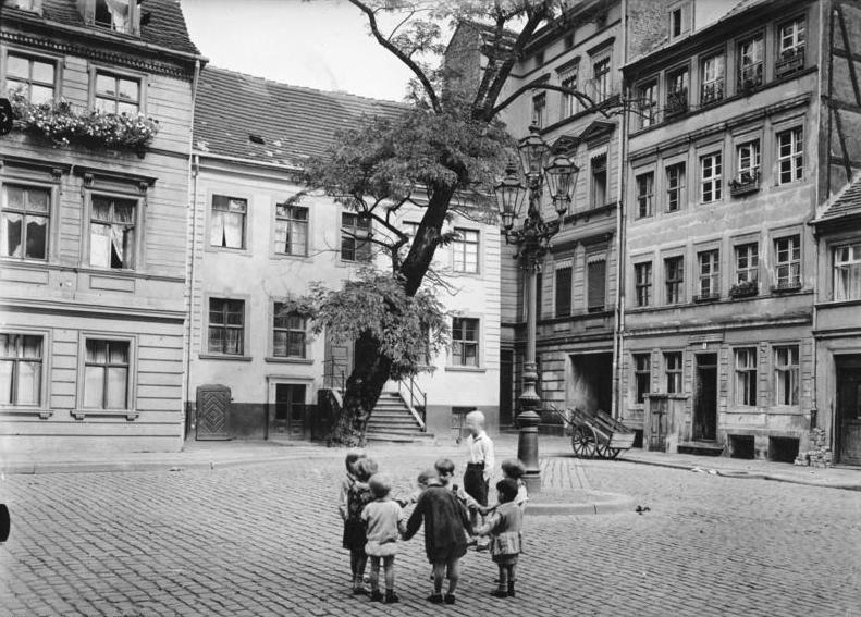 Berlin, spielende Kinder im "Jüdenhof" "Hier, dicht bei der Stadtmauer, war der Ort, wo im Mittelalter die Juden wohnten, abgeschlossen von den anderen, mit denen sie keine bürgerliche Gemeinschaft verband....1671 erließ der Grosse Kurfürst ein Schutzedikt für die Juden." In dem Hause mit der Akazie wohnte der Generalfiskal Wilhelm Duhram (+1735). Aufnahme 1930